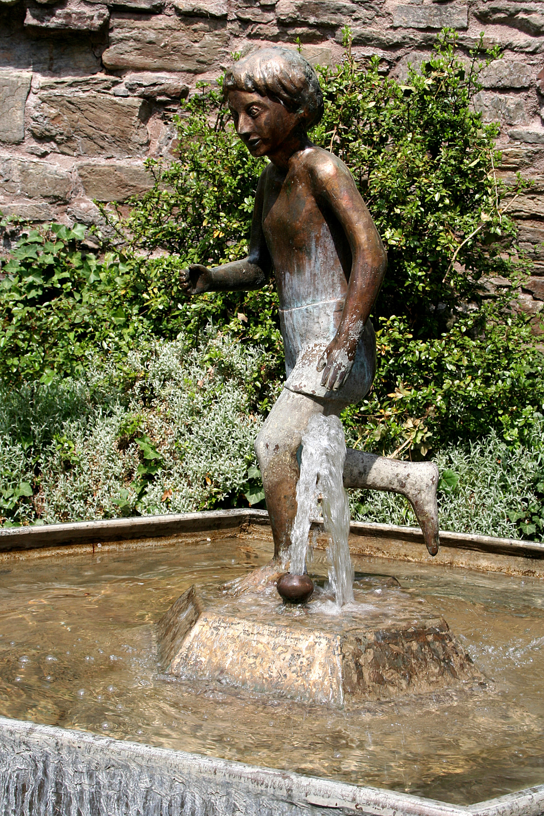 Barfußläuferbrunnen, mundartlich Sääner Bawesläwer-Brunnen, in Bendorf-Sayn, Abteistraße. Barfußläufer war ein Spottname für die Sayner, den sie inzwischen mit einem gewissen Stolz tragen. Der Brunnen wurde in der früheren Kunstgießerei Schmidt und Wahl gegossen und im Juni 1984 aufgestellt. Modell gestanden hatte der damals achtjährige Torsten Wahl. (Quelle: Heimatzeitung Blick aktuell. Abgerufen am 6. Juli 2019.)